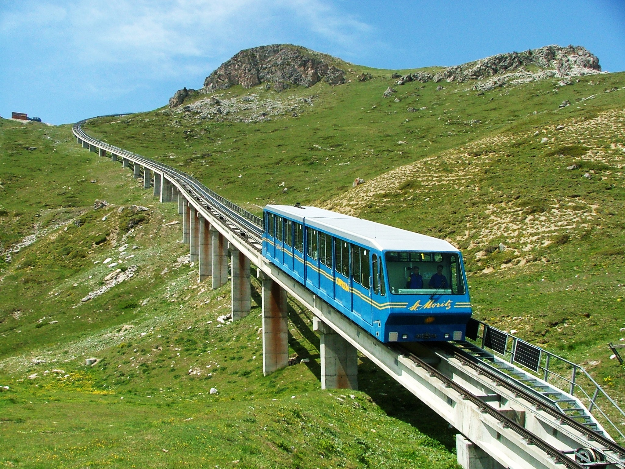 Kolej z Sankt Moritz na Chantarellę i Corviglię w 2006r.